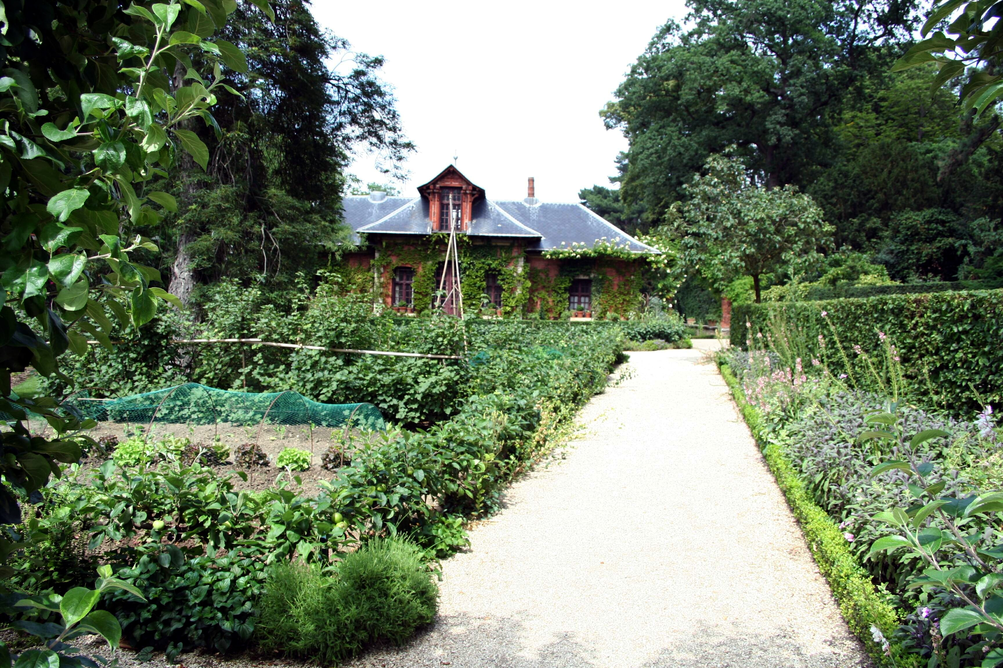 Jardin potager de Bagatelle - Paris (France)